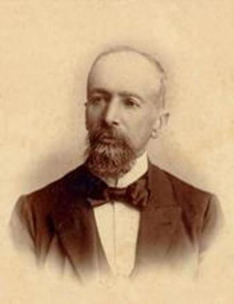 Retrato del Dr. Luis Felipe Borja Pérez (padre), eminente jurisconsulto, político, literato y maestro ecuatoriano. Nacido en Quito (Ecuador), el el 20 de febrero de 1845 y fallecido el la misma ciudad el 13 de abril de 1.912.